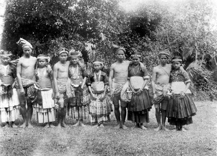 Repronegatief. De 'Marego' dans te Kulawi, Donggala, Celebes